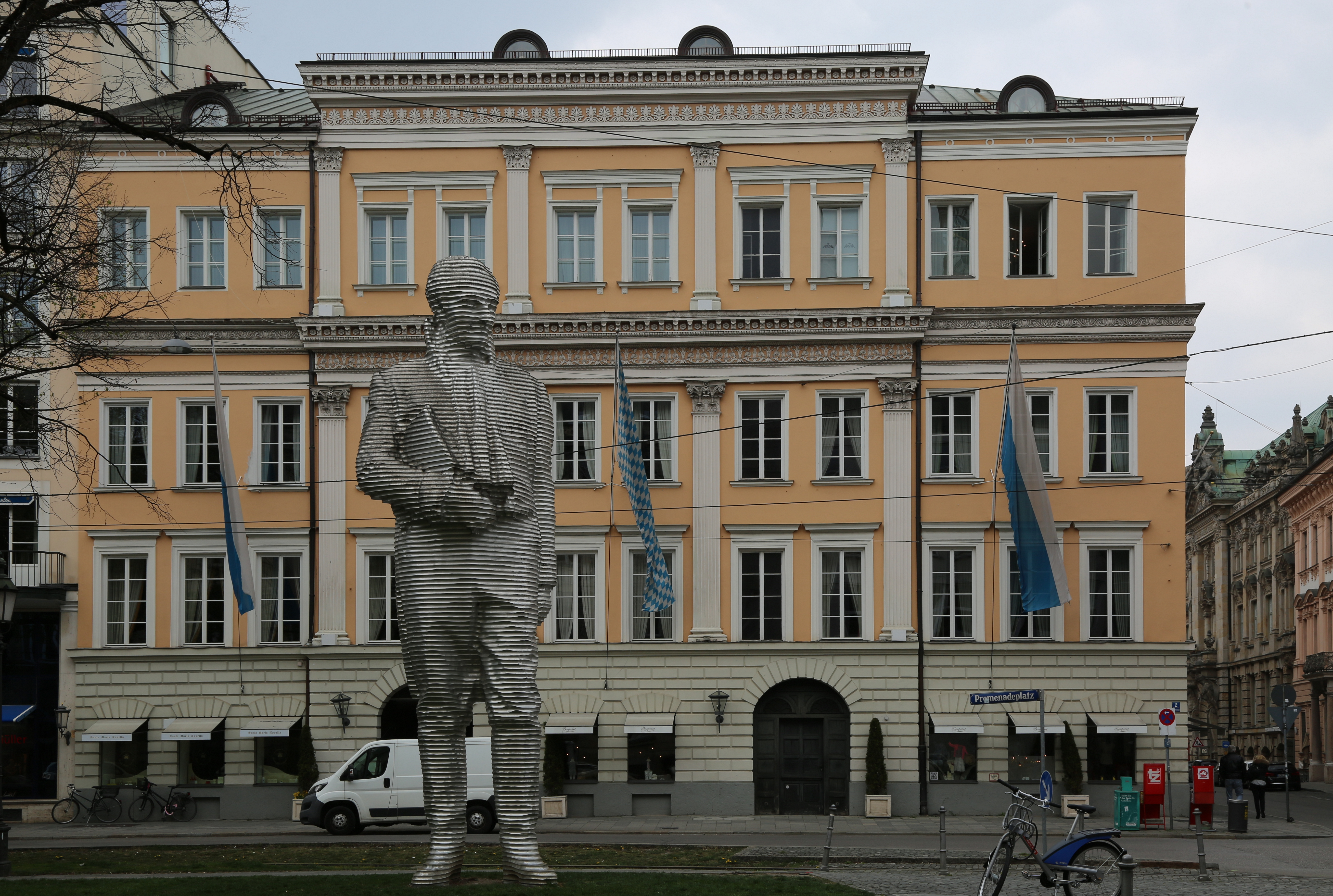 Palais Montgelas, Promenadenplatz, München